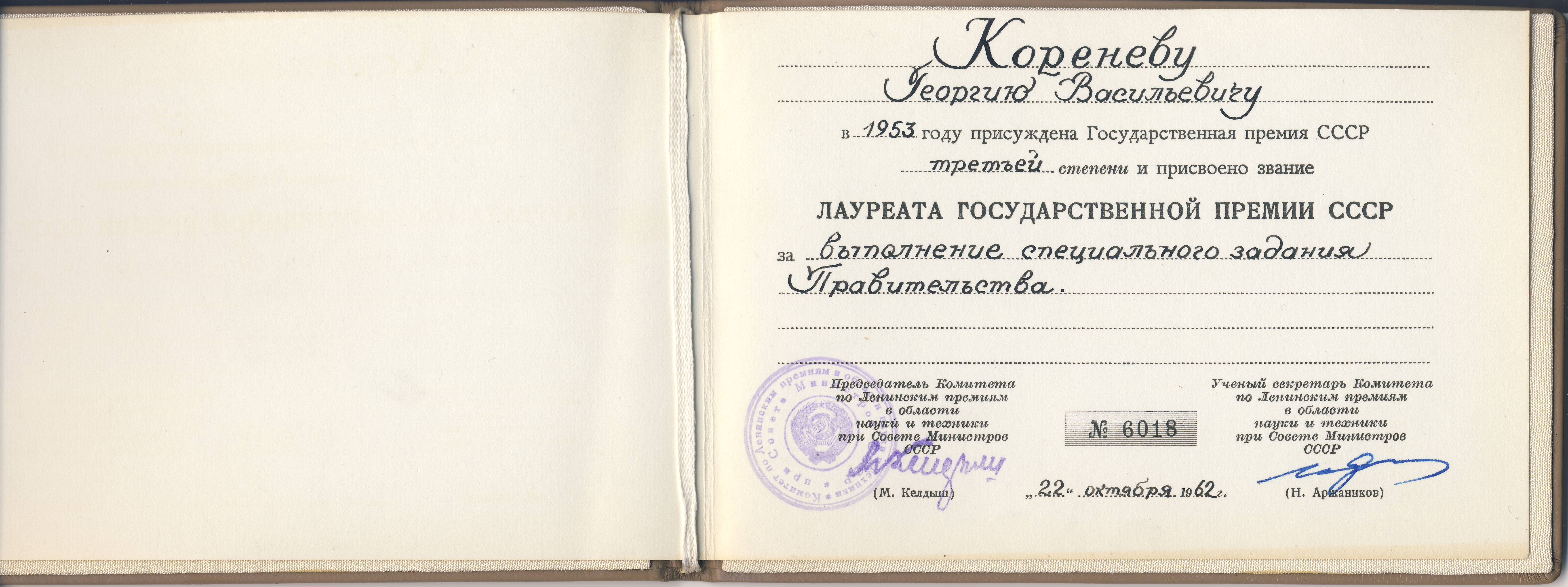 Фотокопия удостоверия диплома Сталинской премии советского ученого и конструктора Коренева Георгия Васильевича (1904-1980)